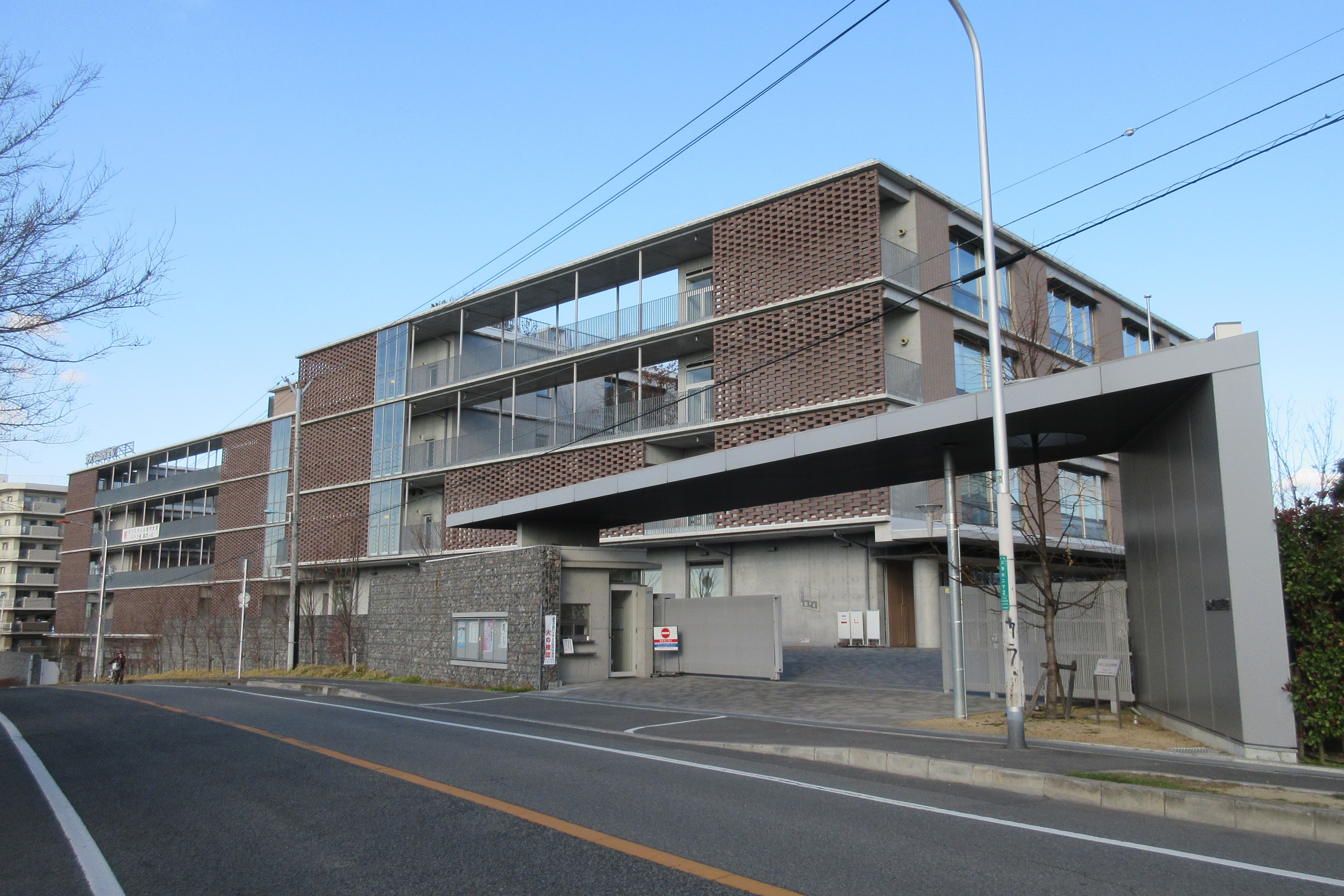 東大谷高等学校泉ヶ丘キャンパス